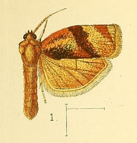 Choristoneura occidentalis